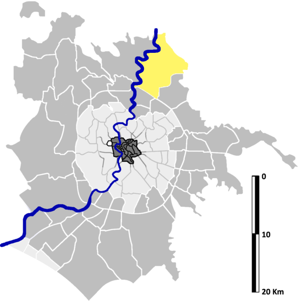 Marcigliana